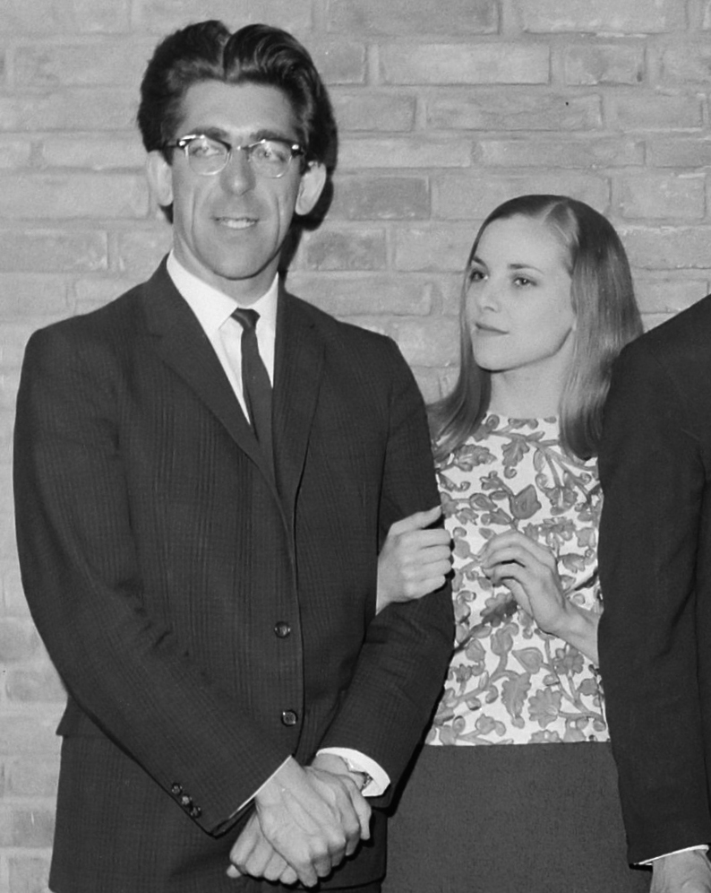 Royal Ballet uit Engeland in Hiltonhotel te Amsterdam, v.l.n.r. Ashley Lawrence, Doreen Wells